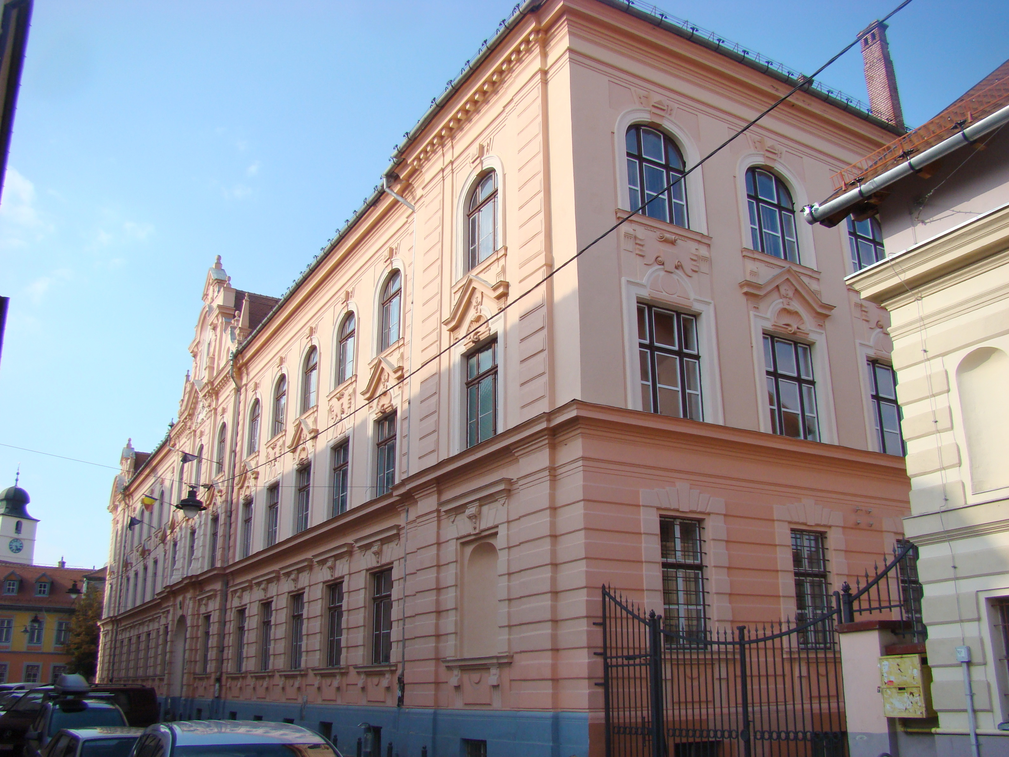 Colegiul Național „Gheorghe Lazăr” din Sibiu